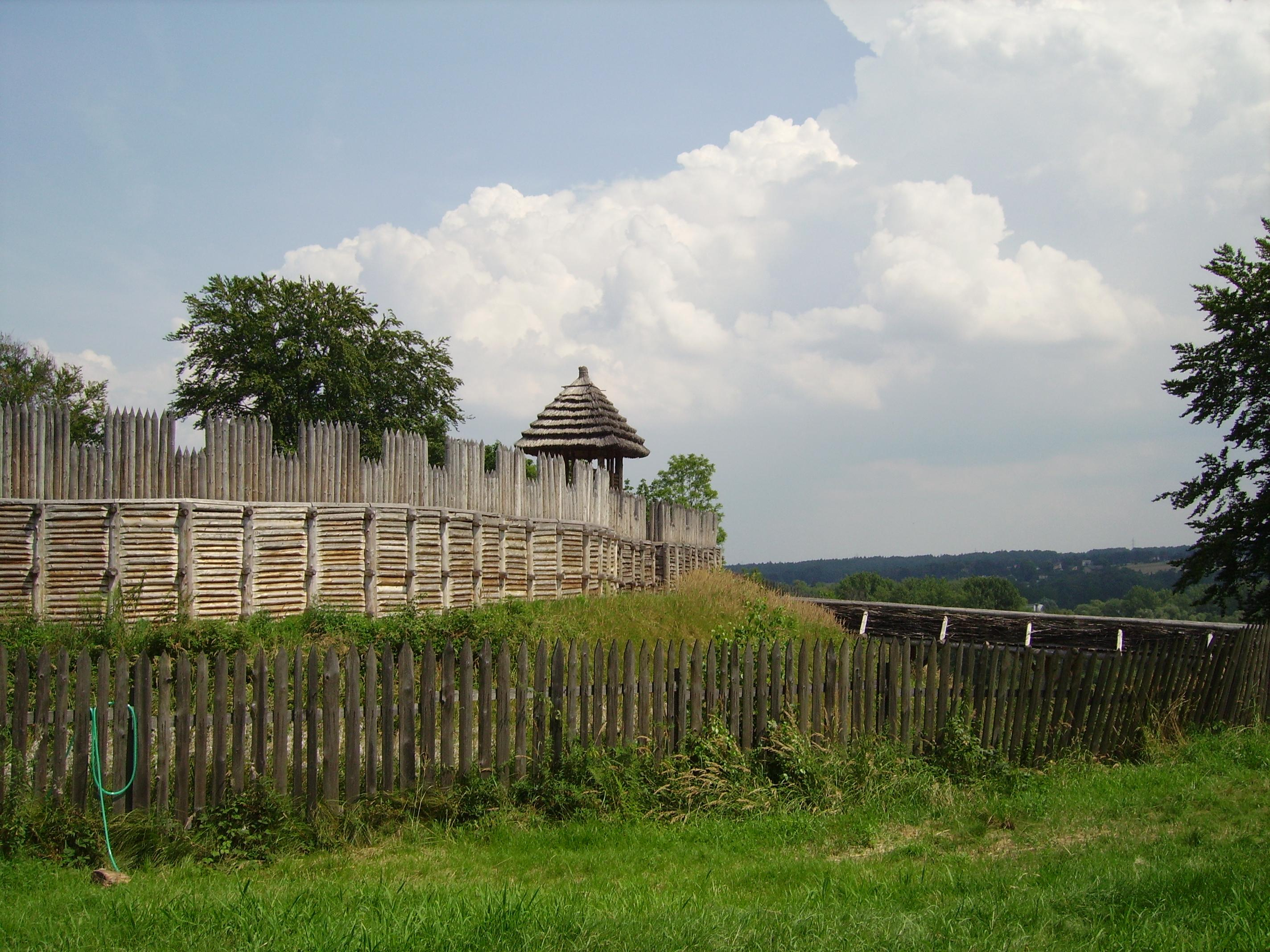 Archeopark Chotěbuz-Podobora (Cz)